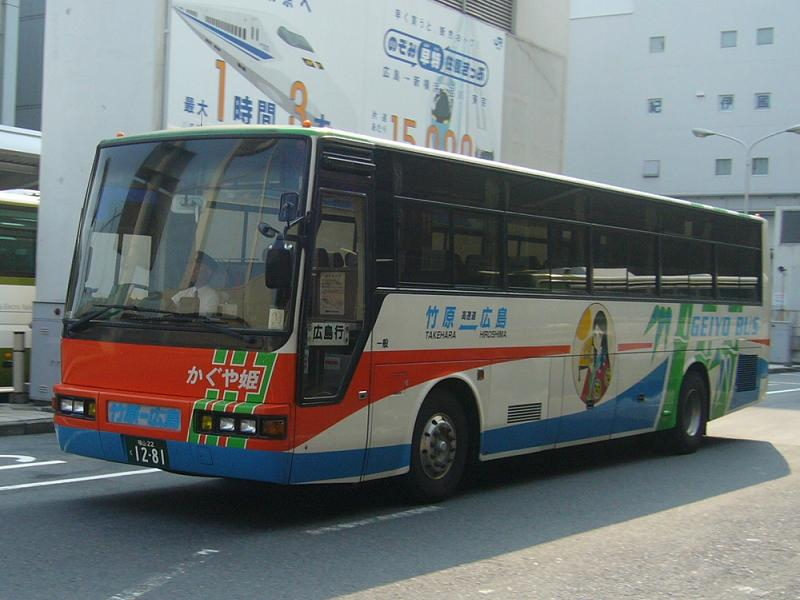 登録番号 福山22く12-81 芸陽バス所属 かぐや姫号用 2006年6月5日 広島バスセンターにて撮影